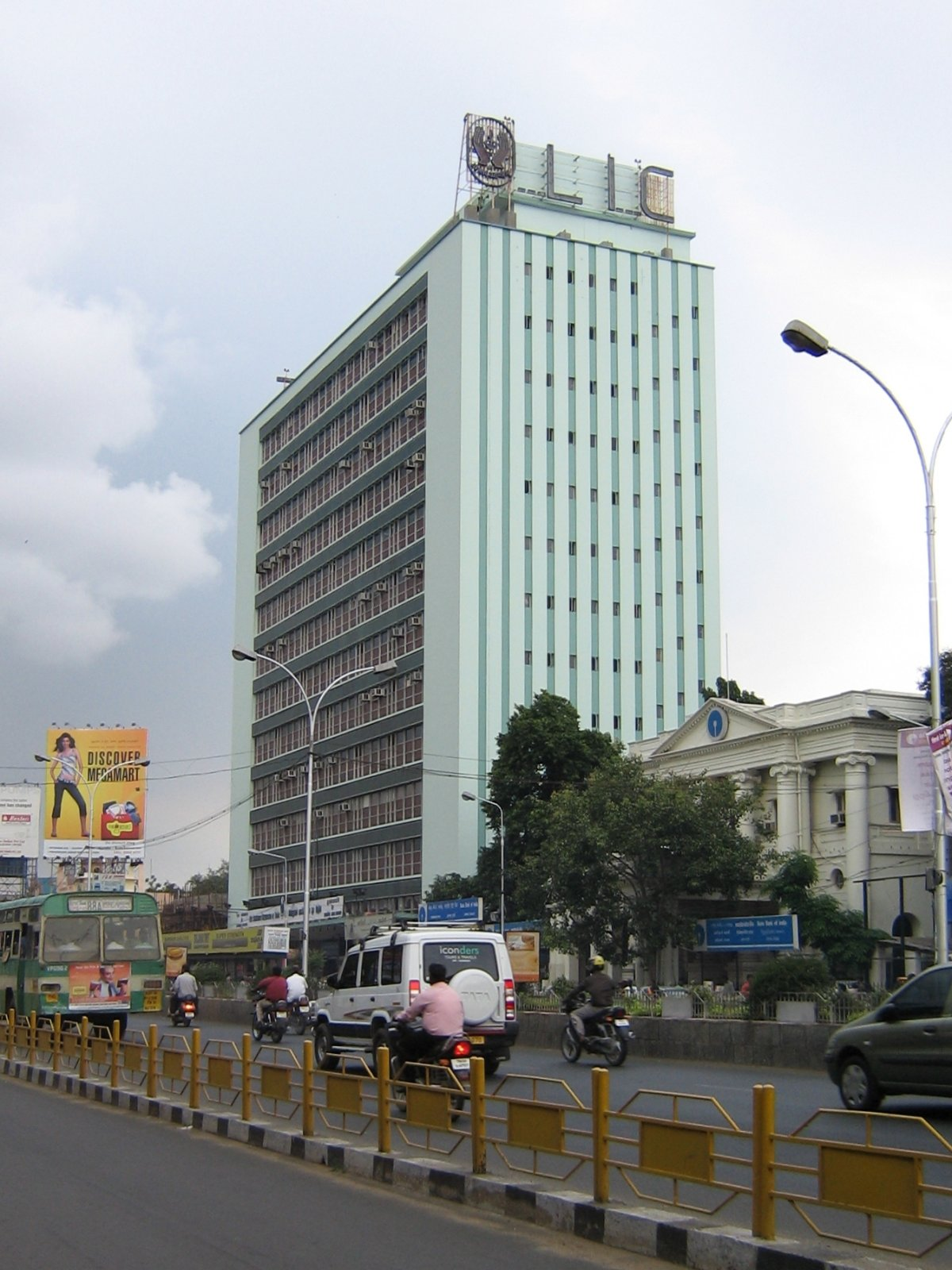 LIC Building, Anna Salai, Chennai.